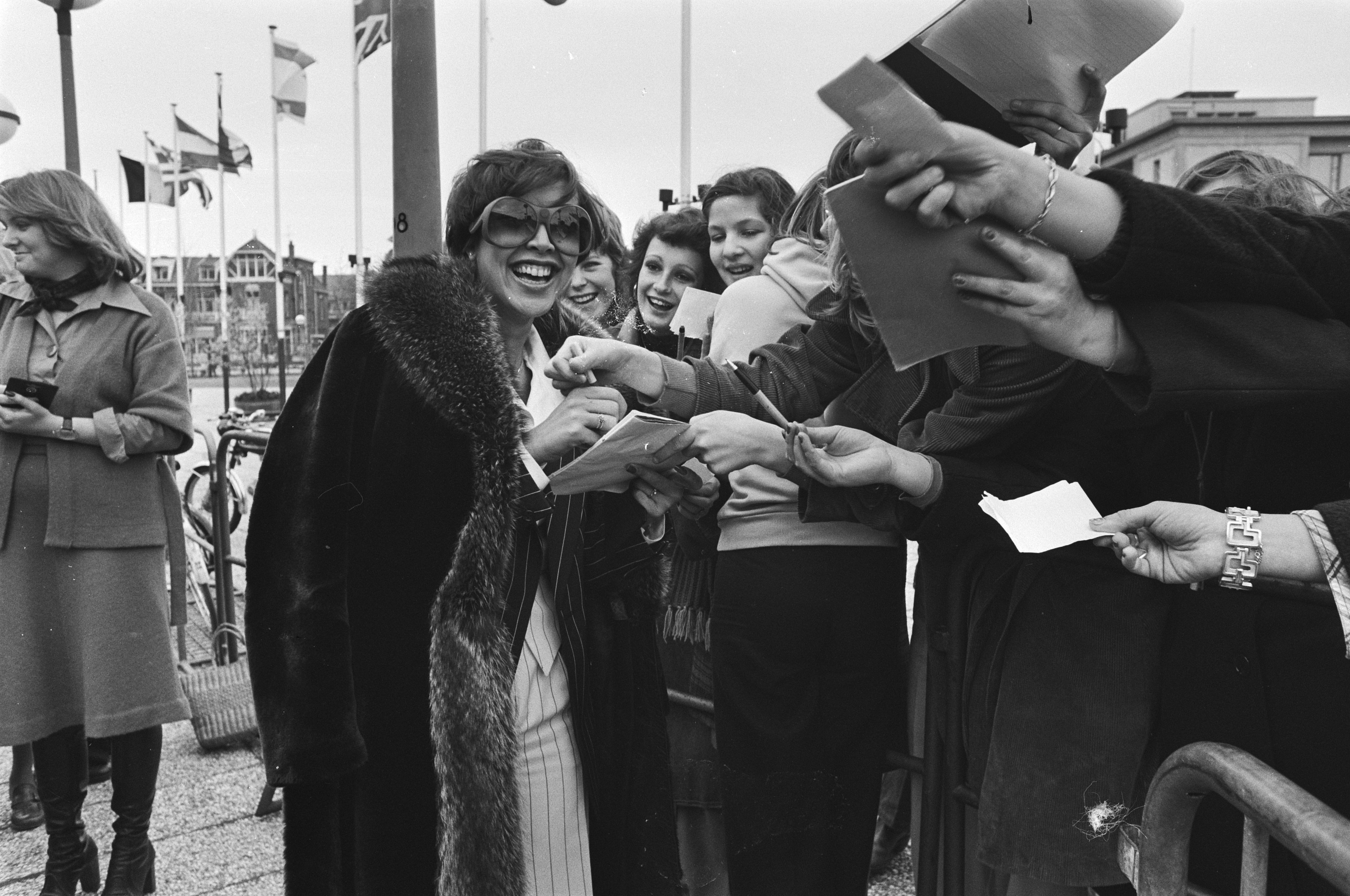 Collectie / Archief : Fotocollectie Anefo Reportage / Serie : [ onbekend ] Beschrijving : Voorbereiding Eurovisie Songfestival Den Haag ; Sandra deelt handtekeningen uit aan fans Datum : 31 maart 1976 Locatie : Den Haag, Zuid-Holland Trefwoorden : HANDTEKENINGEN, songfestivals, zangeressen Instellingsnaam : Eurovisie Song Festival Fotograaf : Mieremet, Rob / Anefo Auteursrechthebbende : Nationaal Archief Materiaalsoort : Negatief (zwart/wit) Nummer archiefinventaris : bekijk toegang 2.24.01.05 Bestanddeelnummer : 928-4951